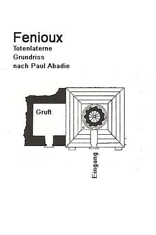 Fenioux, Totenlaterne, Grundriss